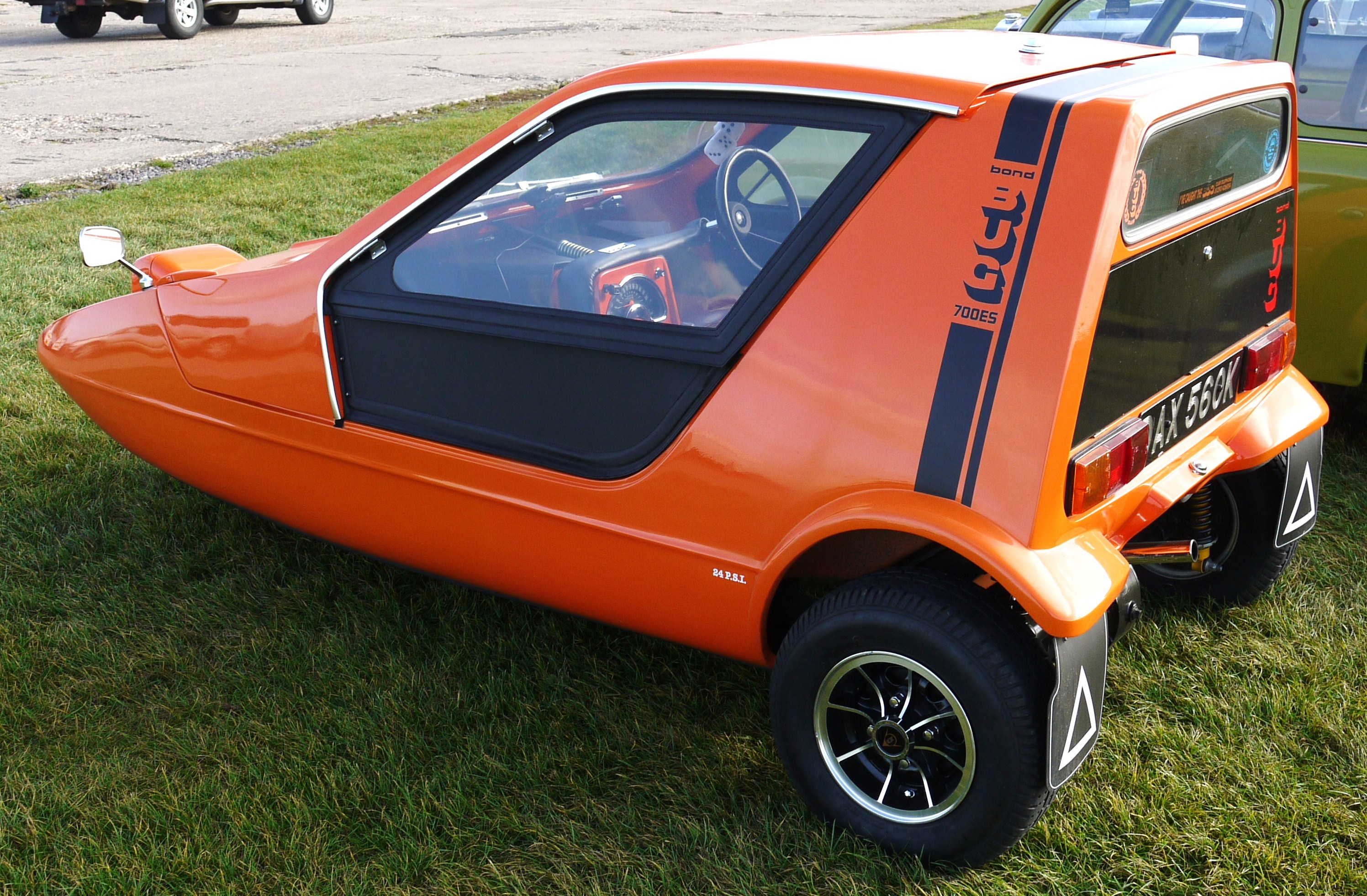 Panasonic G1 14-45 Lens